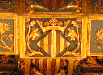 Detall d'un escut al sostre del Consolat de Mar, Llotja de la Seda (València). Valencia coat of arms detail in the ceiling of the Consulate of Sea (Lonja de la Seda, Valencia)